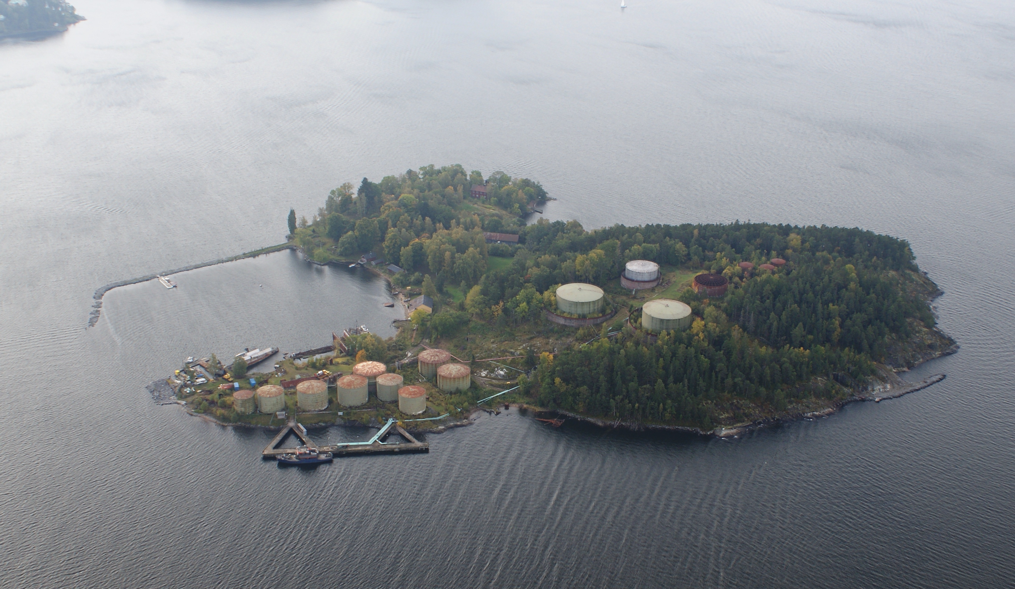 Stora höggarn sedd från helikopter.